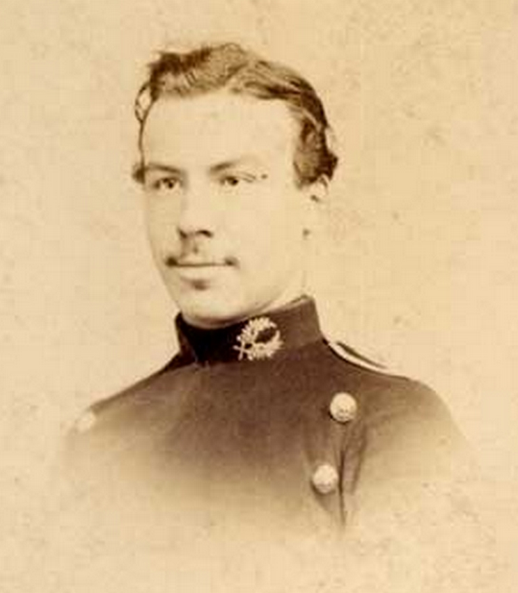 Photographie d'Albert Olry, lorsqu'il était élève de Polytechnique.